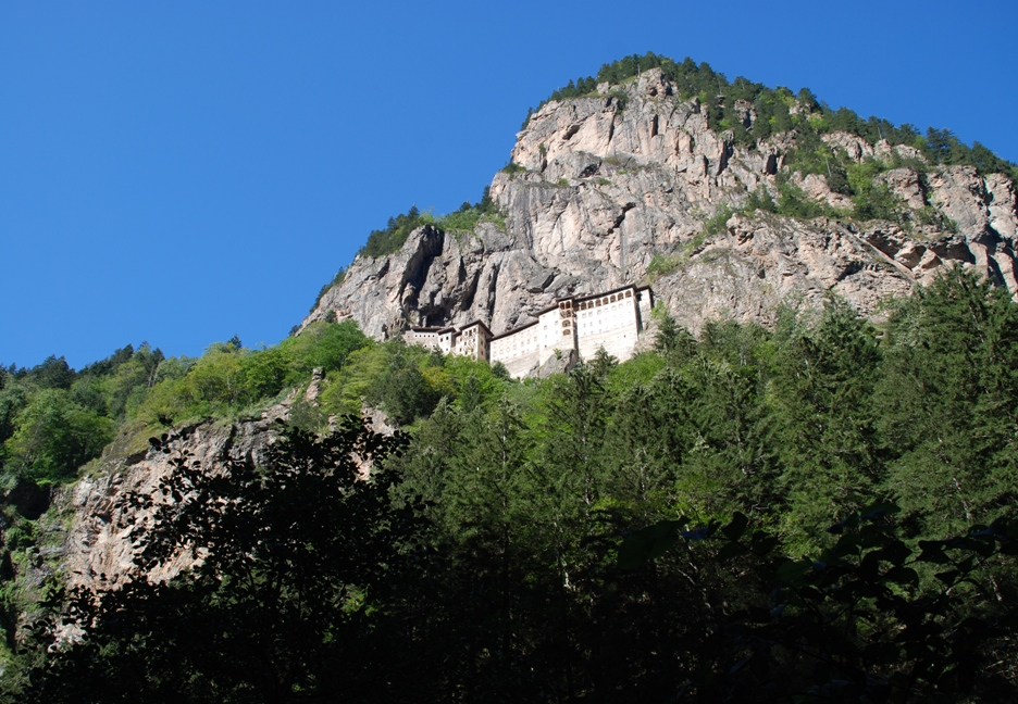 Sumela Kloster